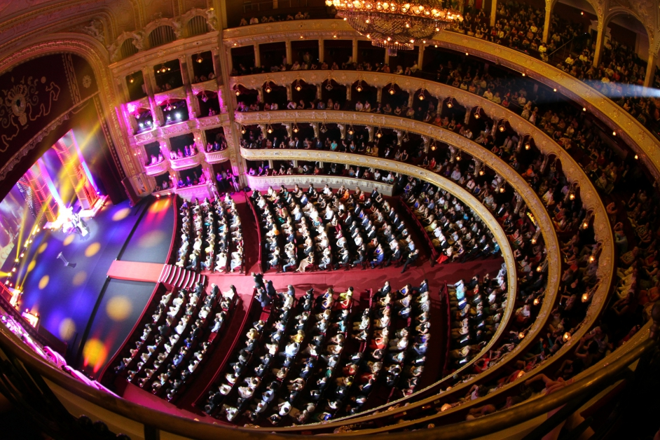 Відкриття 4-ого одеського міжнародного кінофестивалю: Концертна зала Одеського національного академічного театру опери та балету